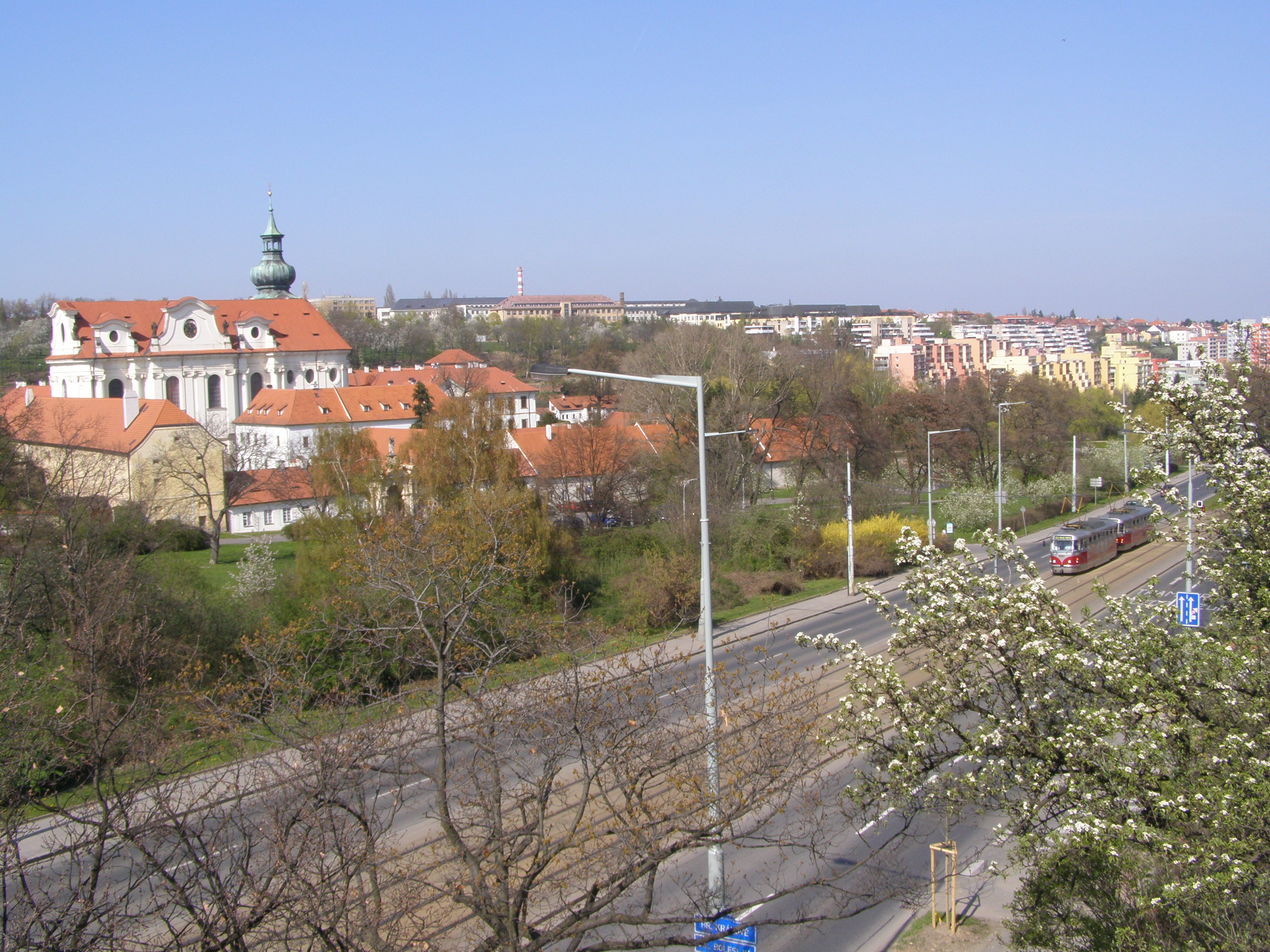 Praha, Břevnov, ulice Bělohorská, vlevo Břevnovský klášter